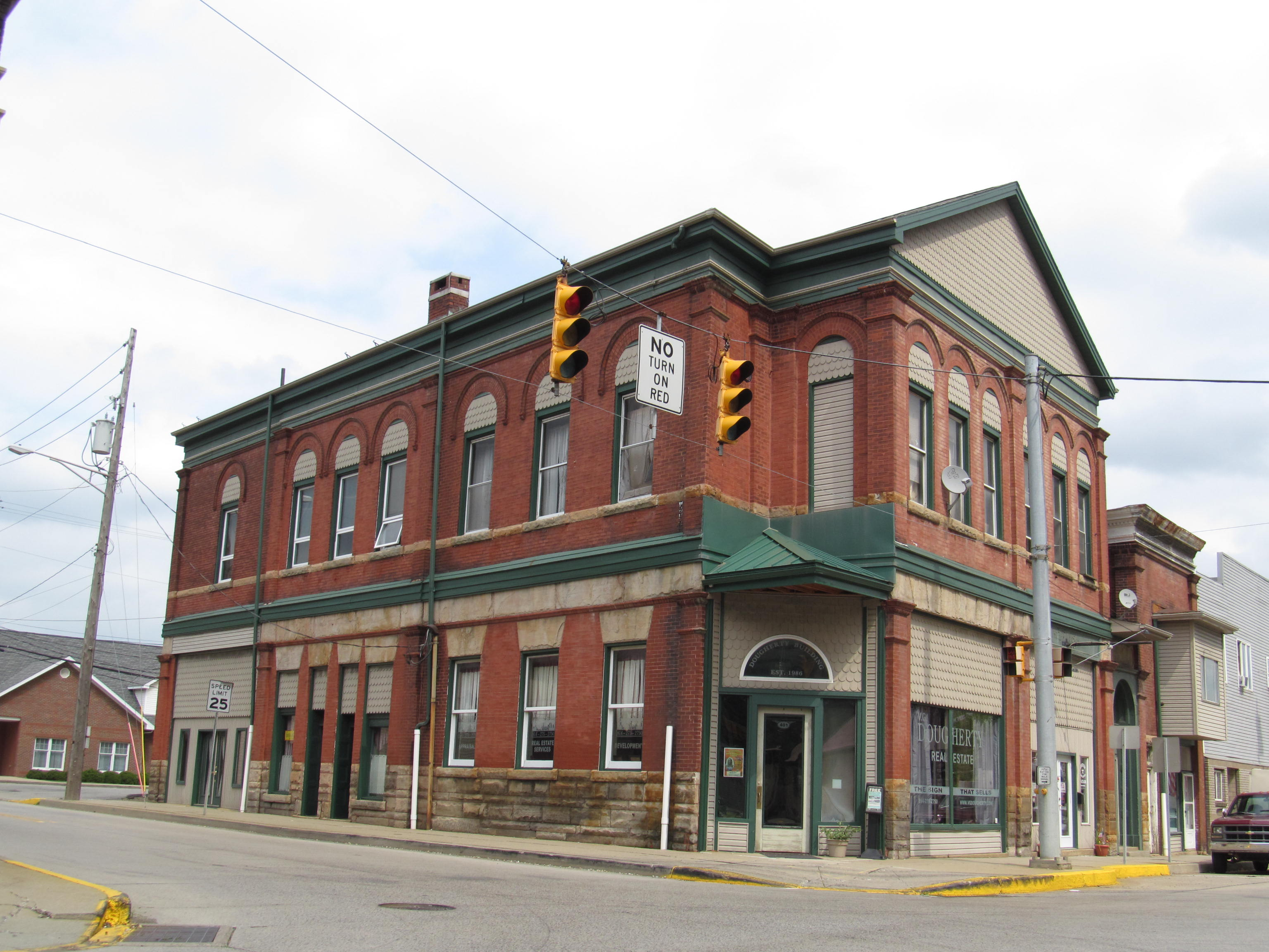 New Bethlehem, Pennsylvania